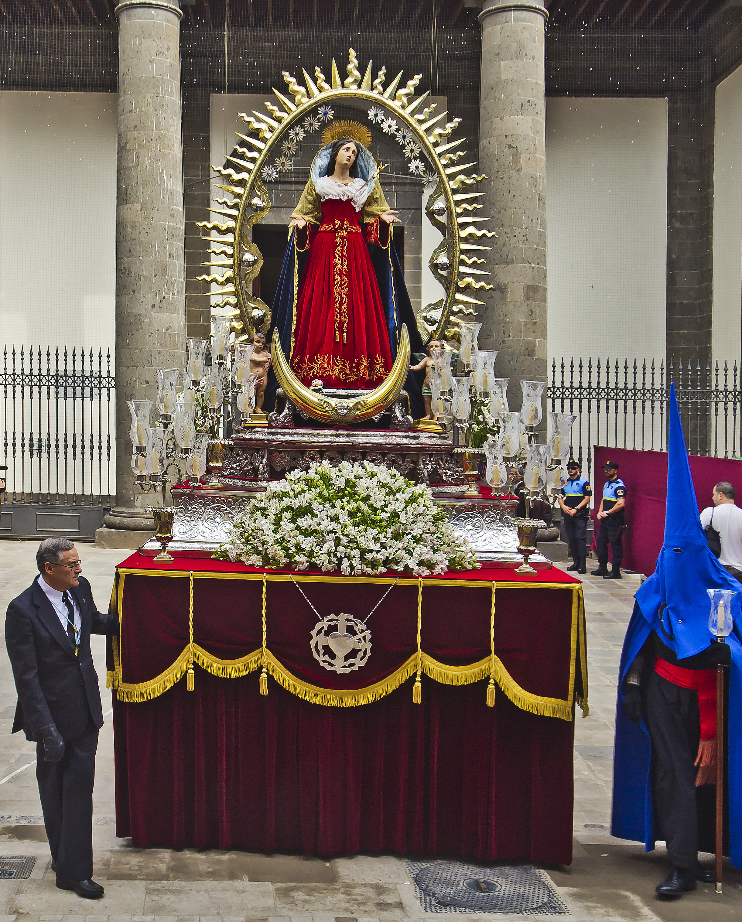 Paso de la Dolorosa